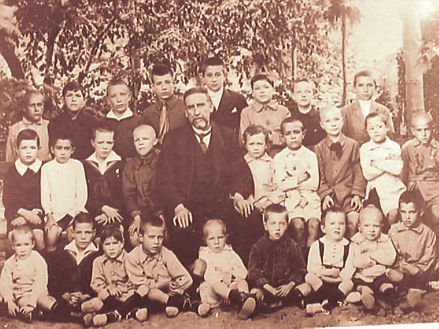 Escola d'Arenys de Munt (1925)